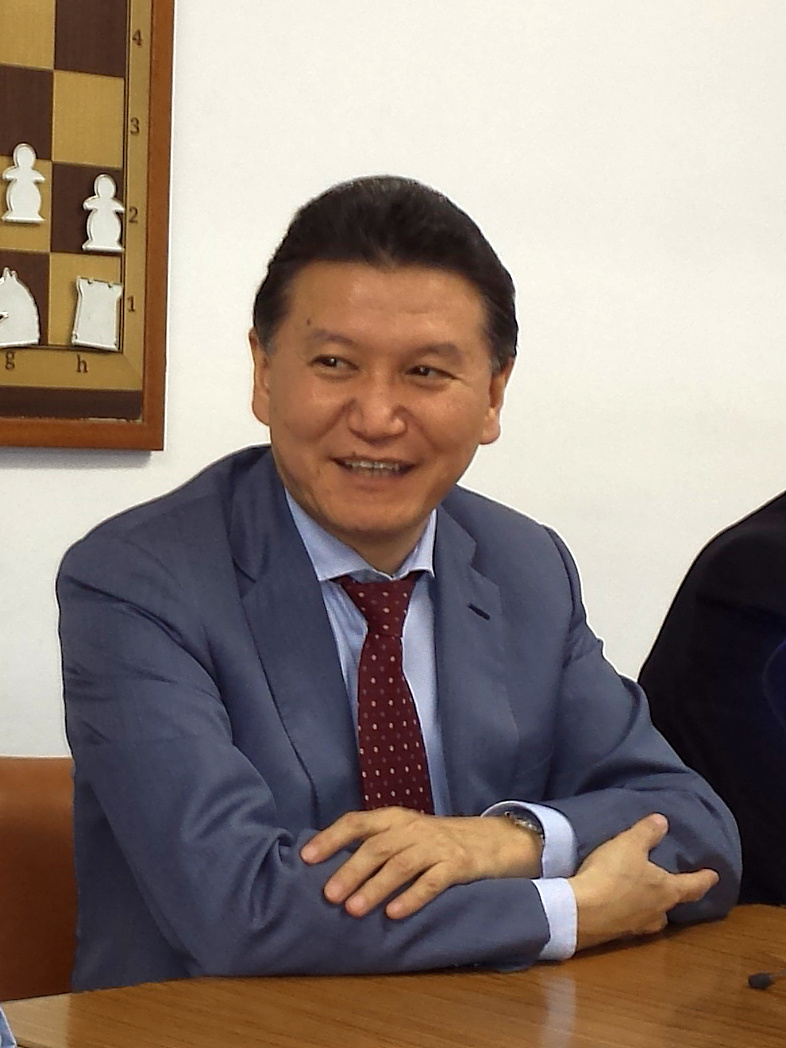 20140520 Visita Ilyumzhinov